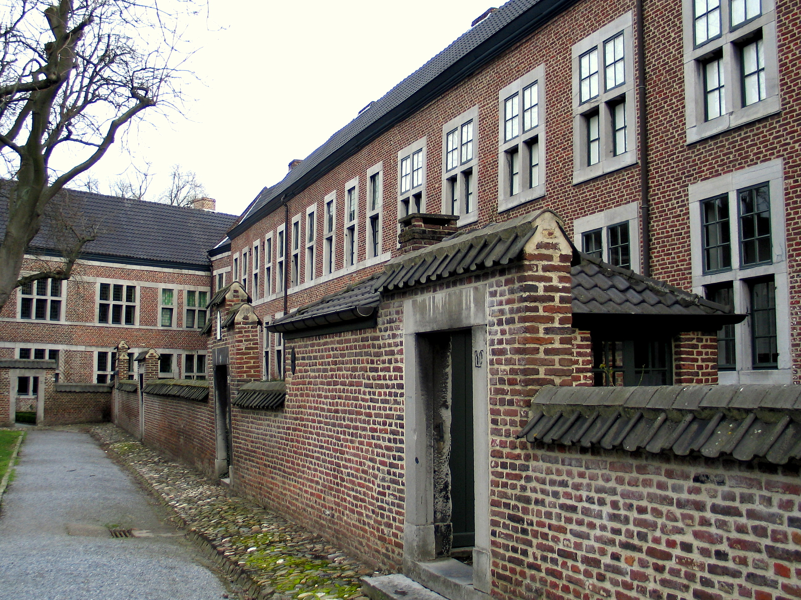 huizen van het Begijnhof te Hasselt, België